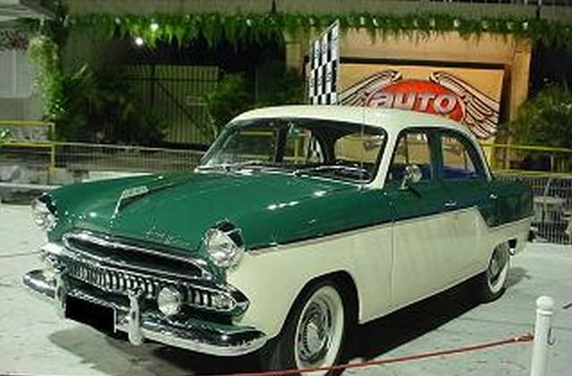 (portuguese) Automóvel Willys Aero sedan, ano 1962, fabricação brasileira